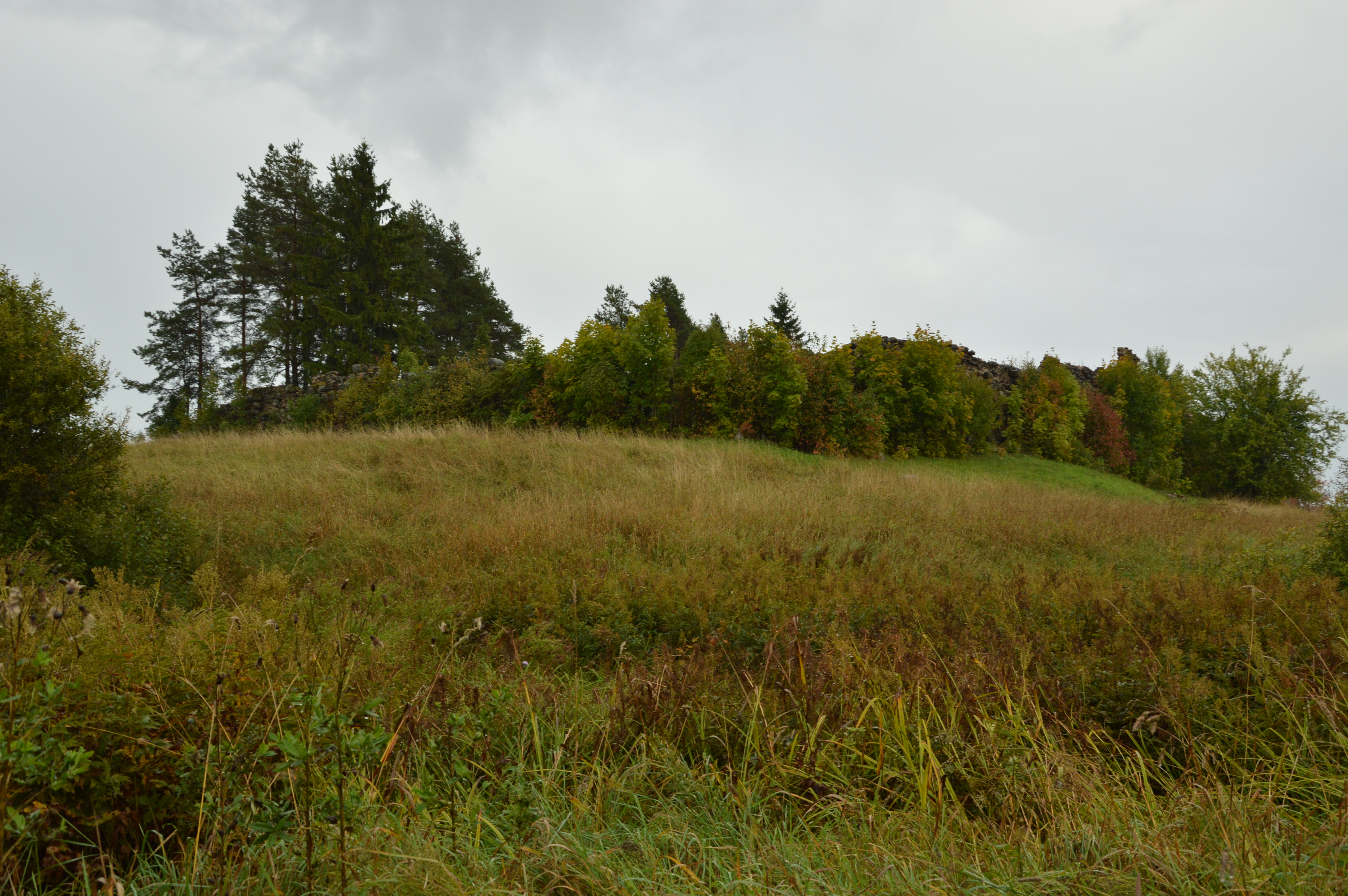 Vana-Pebalgi piiskopilinnus